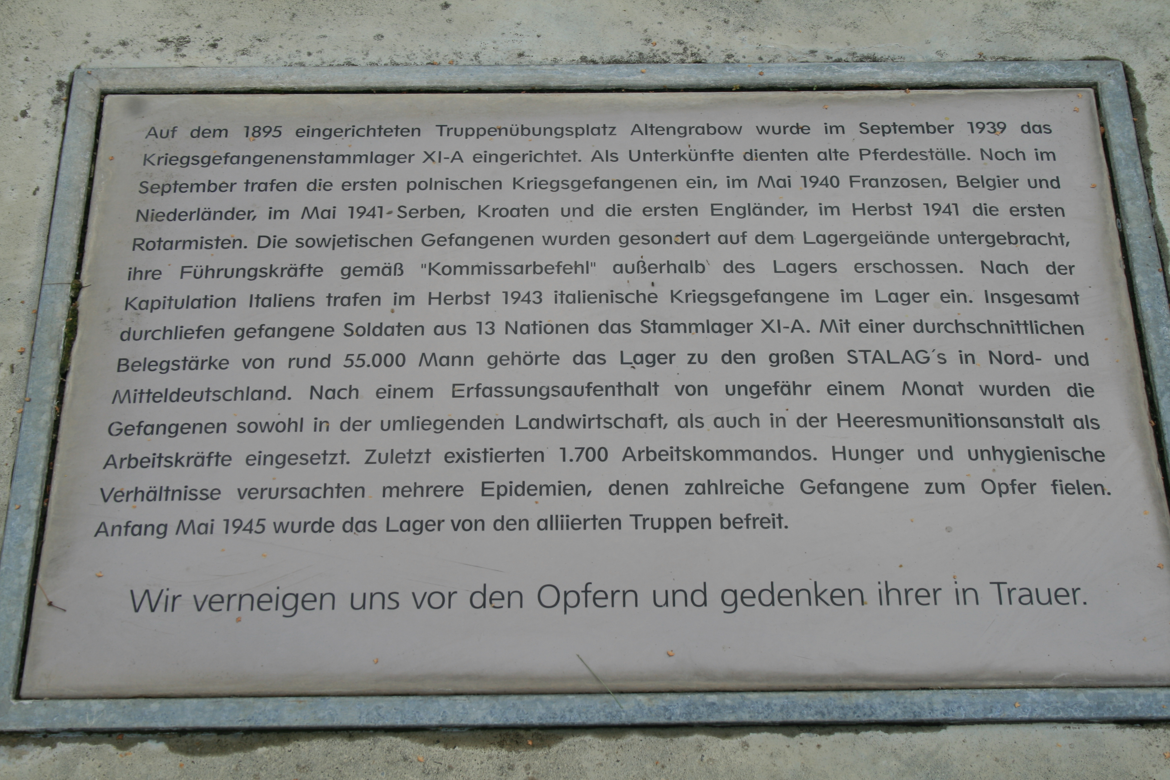 In den Boden der Gendenkstätte eingebaute Hinweistafel